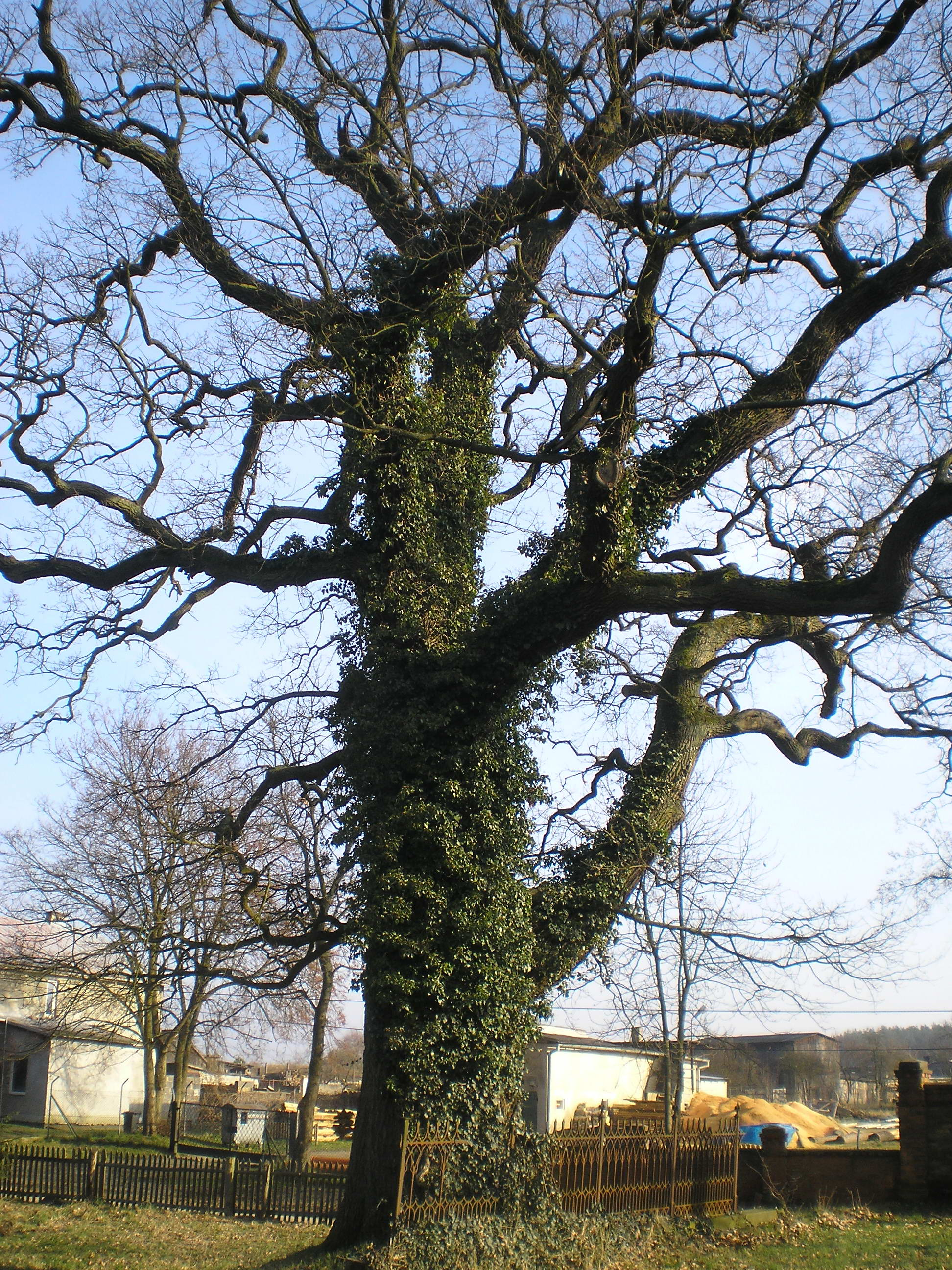 Drugi dąb za kościołem (obok dębu Piotrowego)